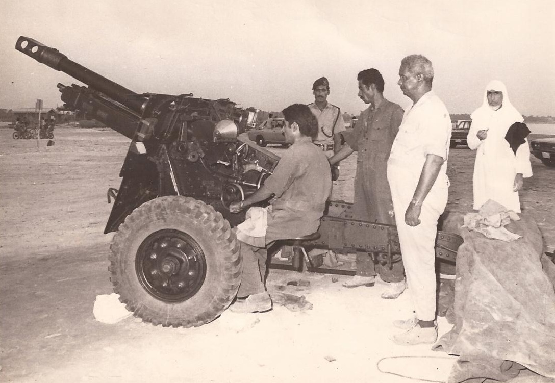 الملا جاسم بن محمد سالم المشرف على مدفع الإمساك والإفطار في البحرين